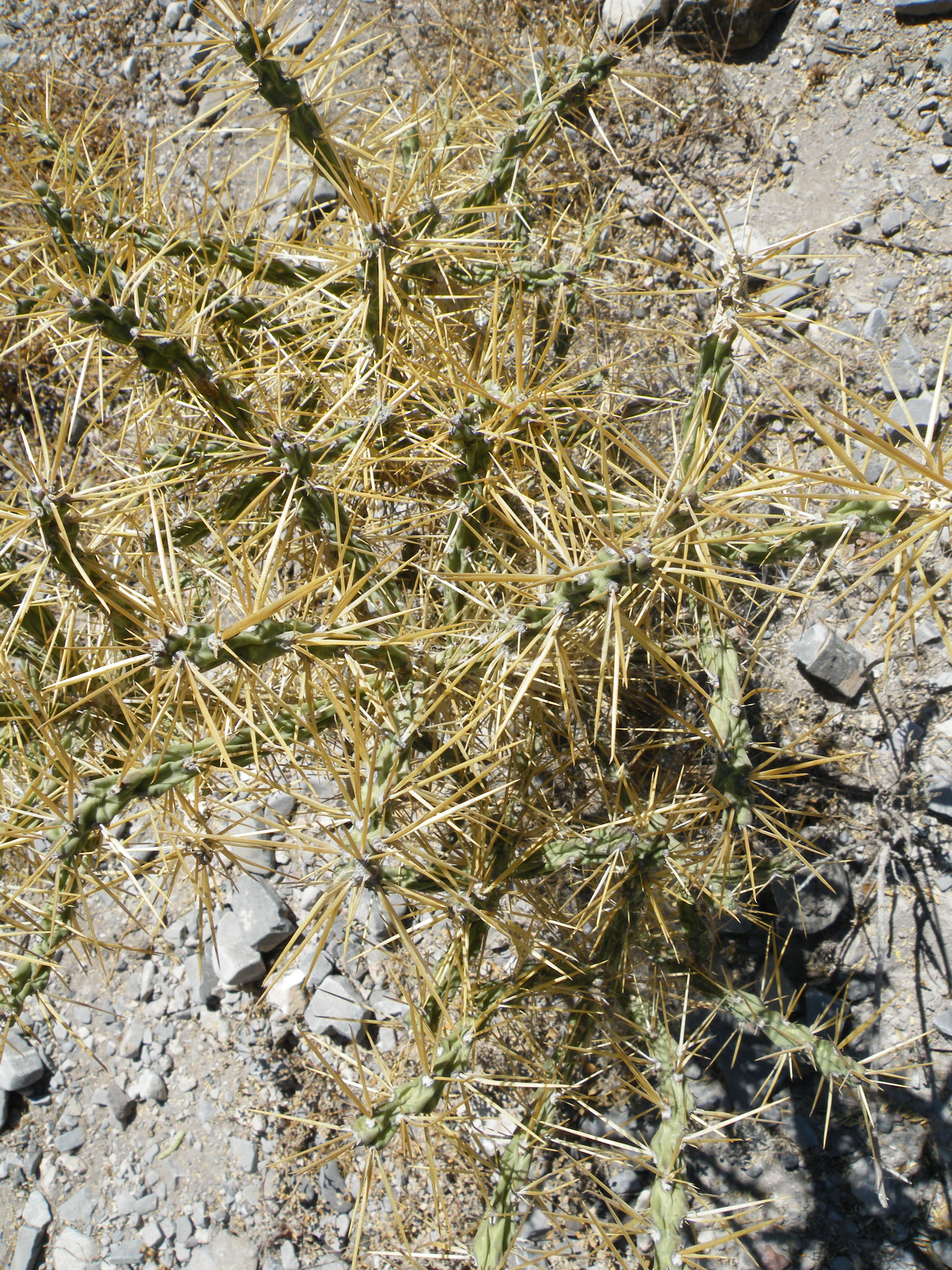 Cylindropuntia kleiniae; Doctor Arroyo, Nuevo Leon